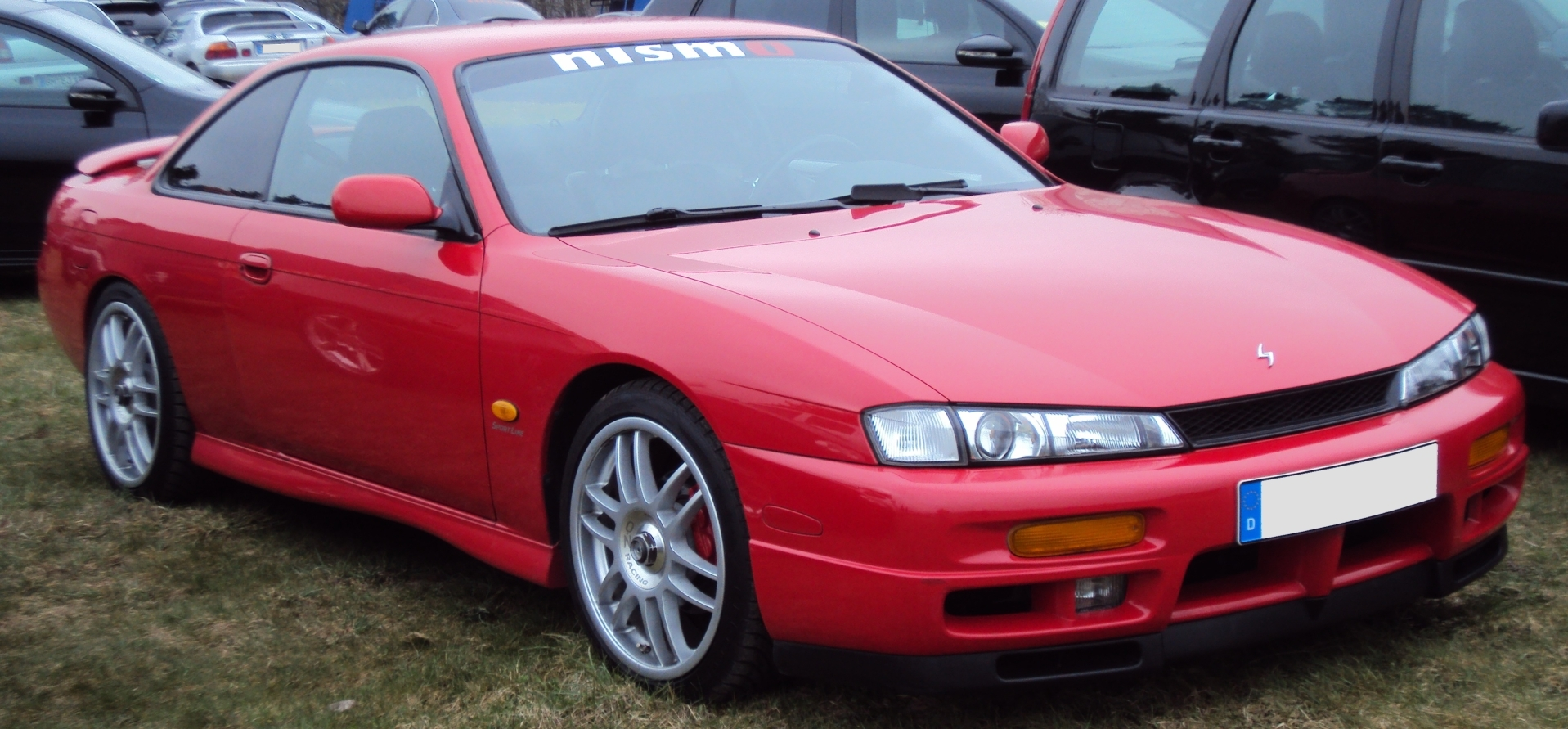 Nissan 200SX S14a Sportline